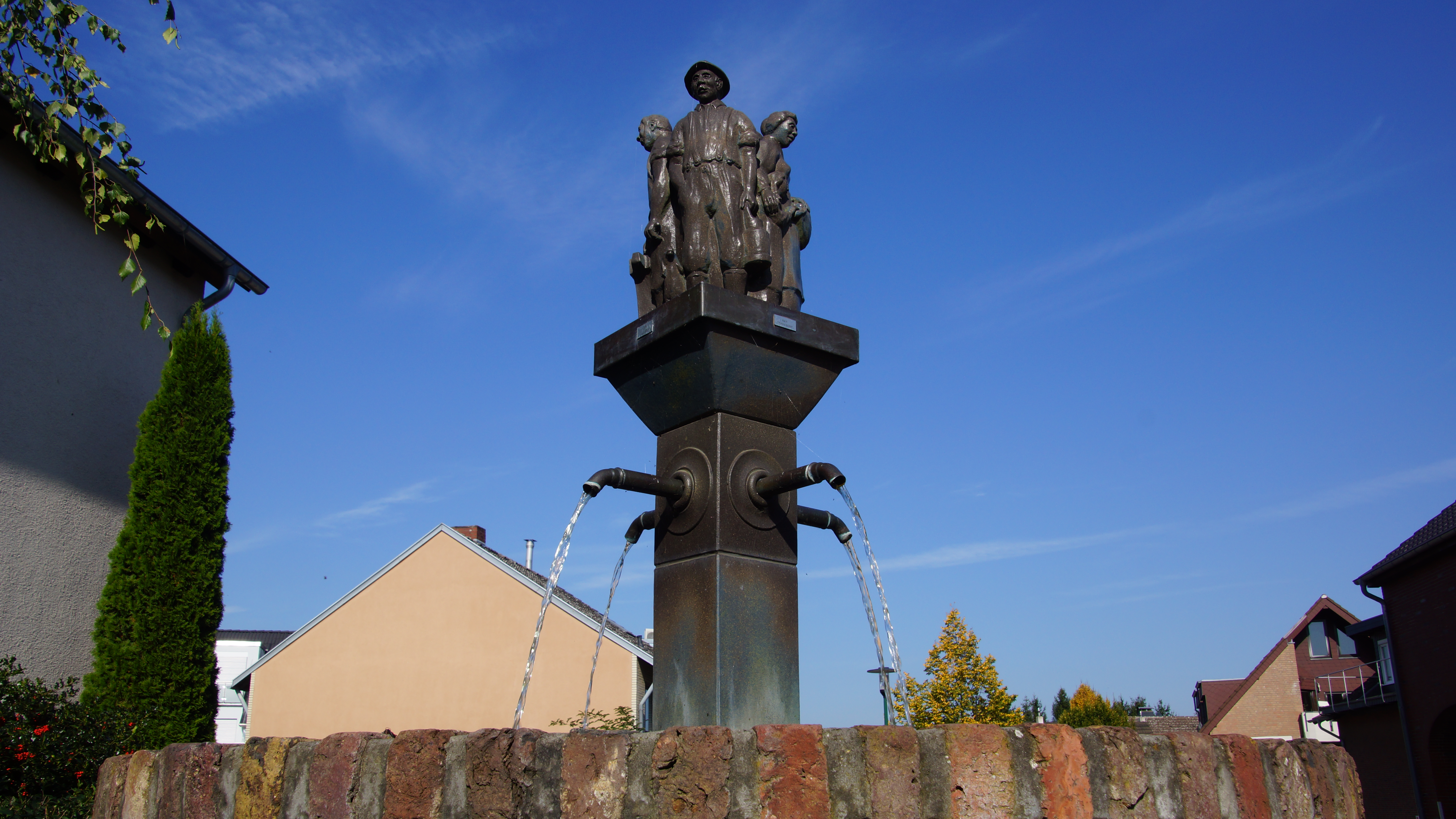 Brunnen in Alstädten-Burbach, Brunnenstraße 16, Der Brunnen zeigt vier Berufe, eine Bäuerin, einen Schmied, einen Fleischer und eine Kauffrau.